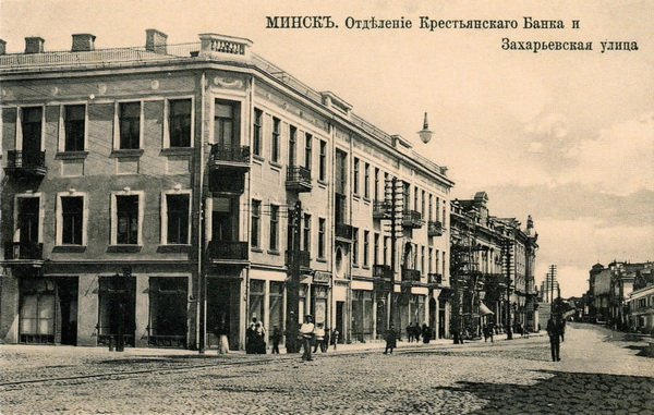 Будынак быў на скрыжаваньні вуліц Захар'еўскай і Серпухаўскай (Валадарскага), у якім размяшчалася адзяленне ммнскага сялянскага пазямельнага банка. Паштоўка пачатку 20-га стагодззя. (У.Ліхадзедаў, "Мінск. Падарожжа ў часе", Мінск, Тэхналёгія, 2008г.)